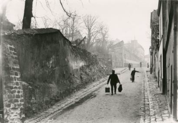 Séeberger frères, Le porteur d'eau de Montmartre